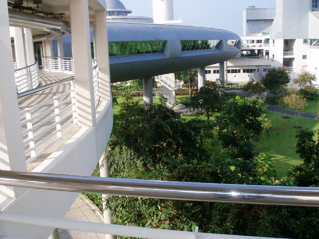 SIU, skylink view